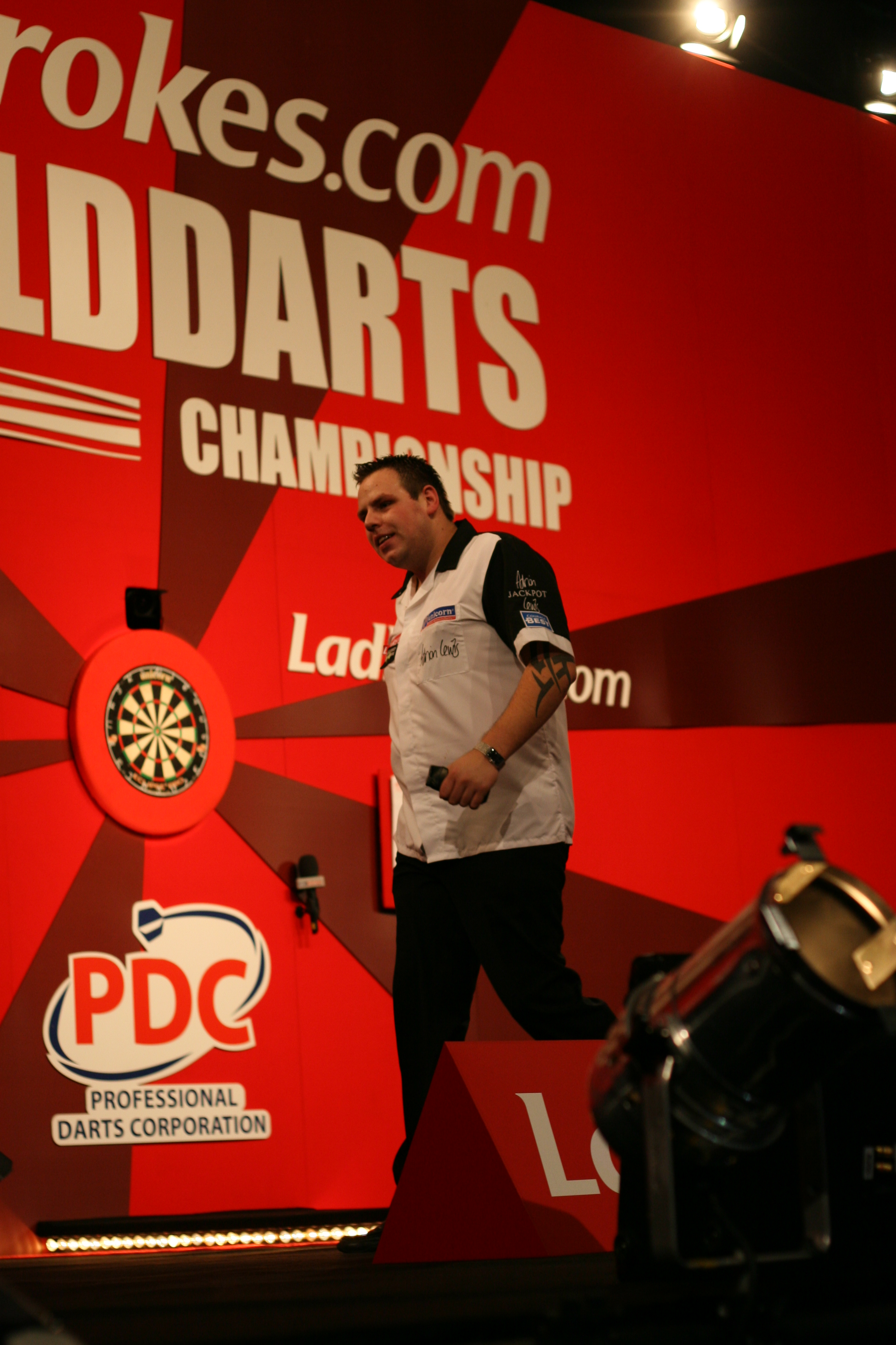 Adrian Lewis